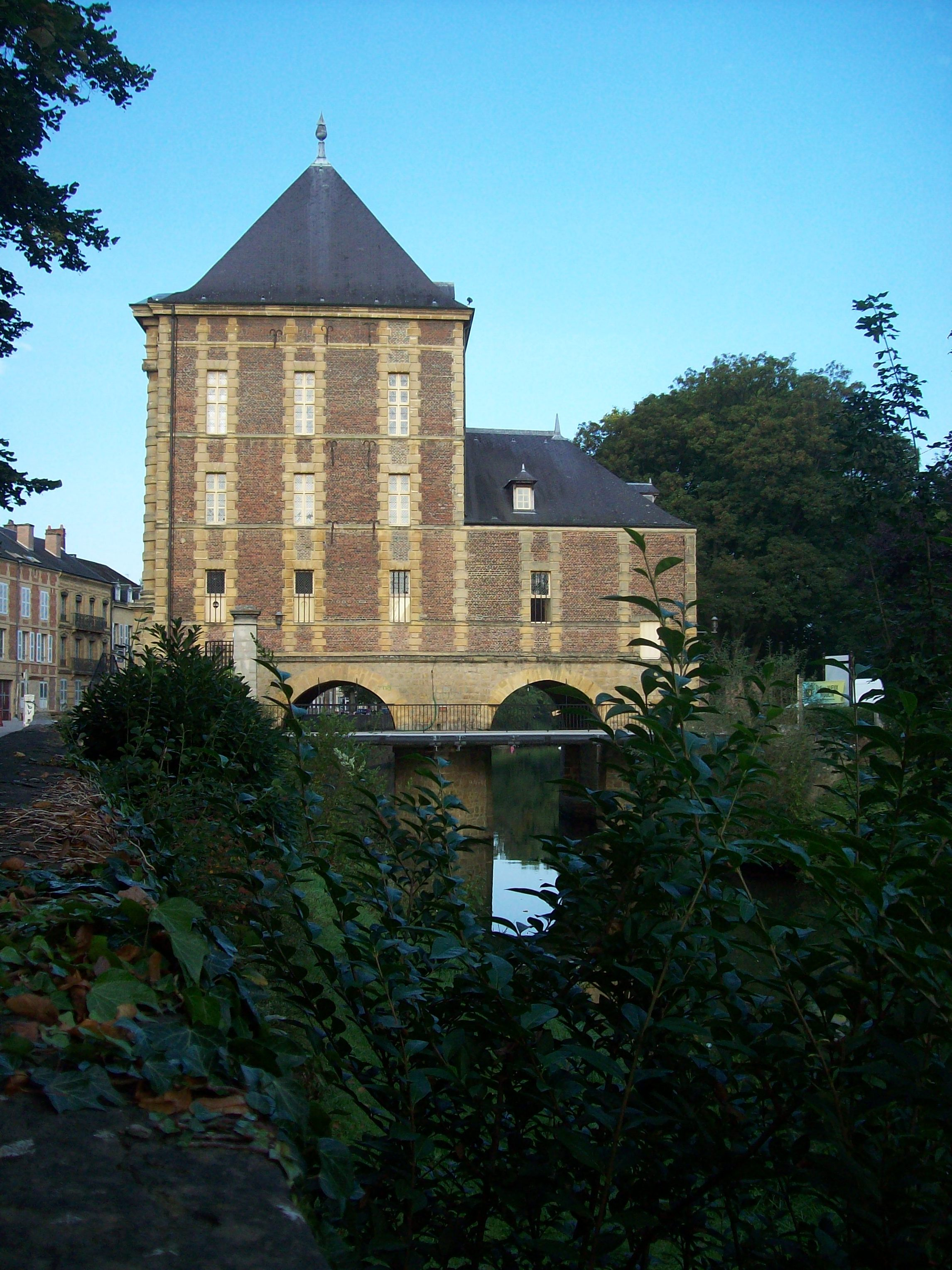 Musée Arthur Rimbaud. . Ville: Charlevile-Mézières Région: Champagne-Ardenne Pays: France